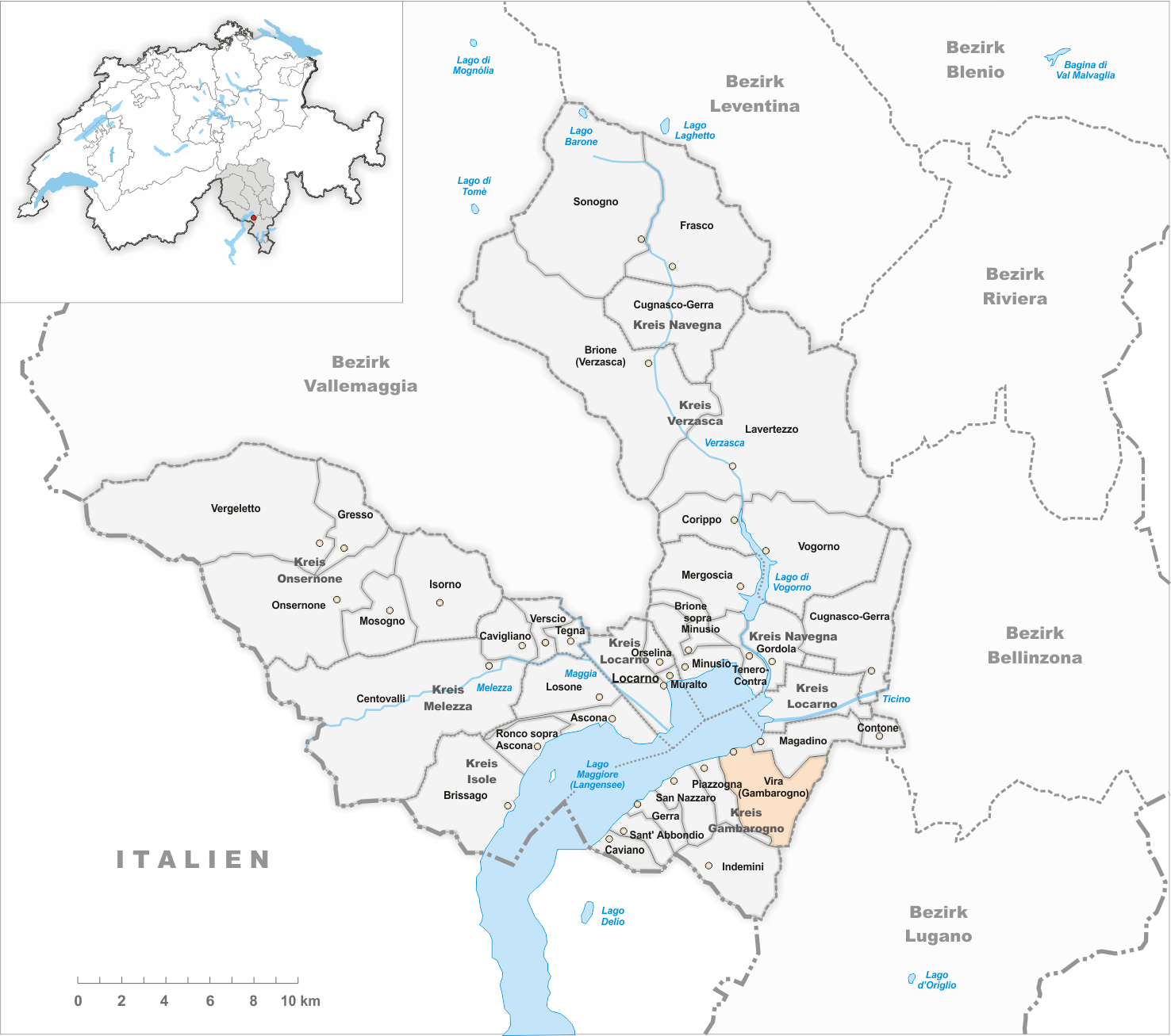 Municipality Vira (Gambarogno) Artist: Tschubby